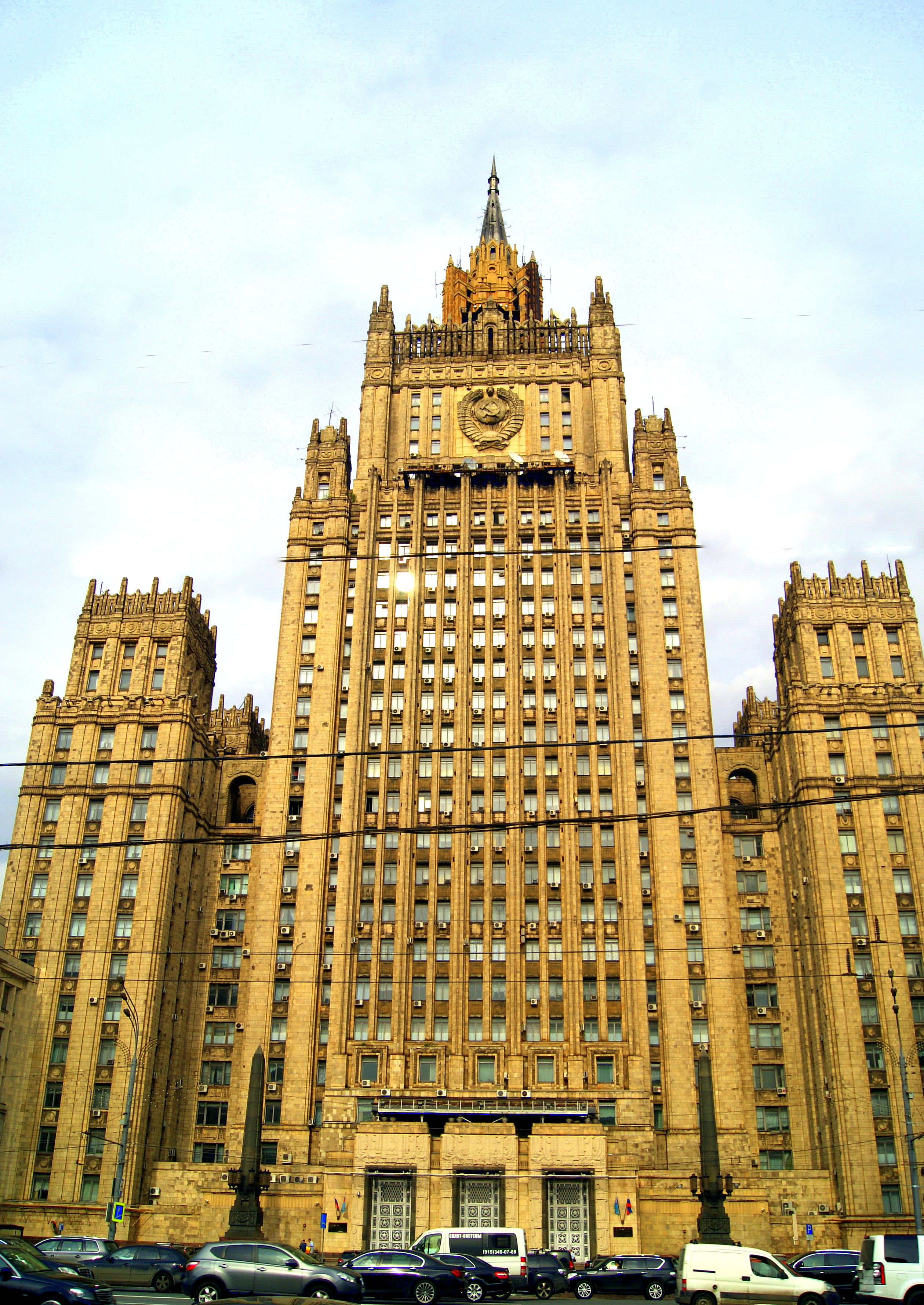 Здание министерств иностранных дел и внешней торговли: Смоленская-Сенная пл., дом 32-34/57/2, строение 2, Арбат, Центральный округ, Москва